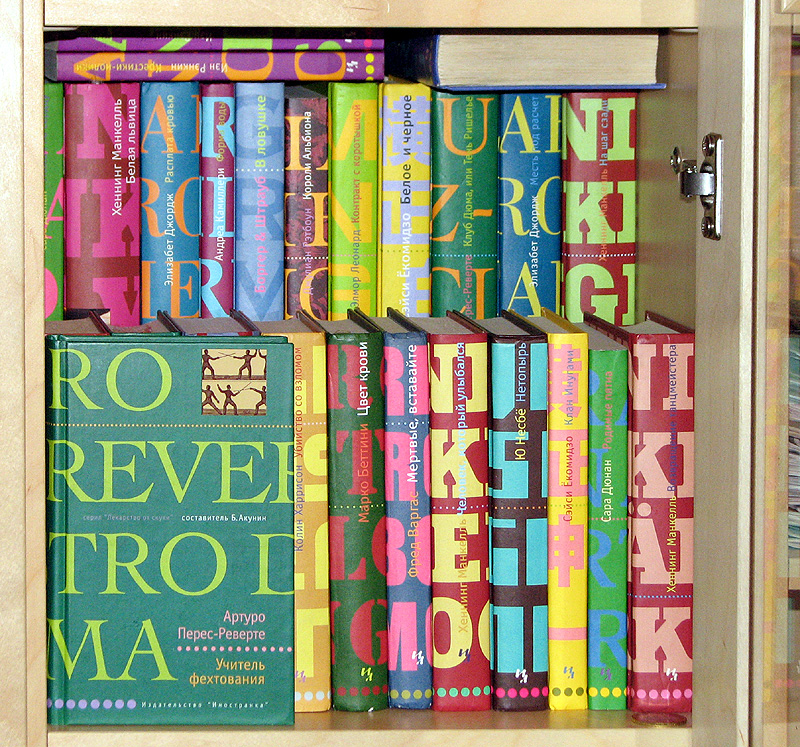 Книги из серии "Лекарство от скуки"